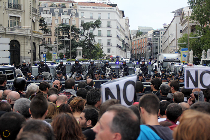 Imagen de la concentración del 25 de septiembre frente al Congreso de los Diputados en Madrid, España. Al final de la misma se produjeron cargas policiales incluso en la estación de Atocha